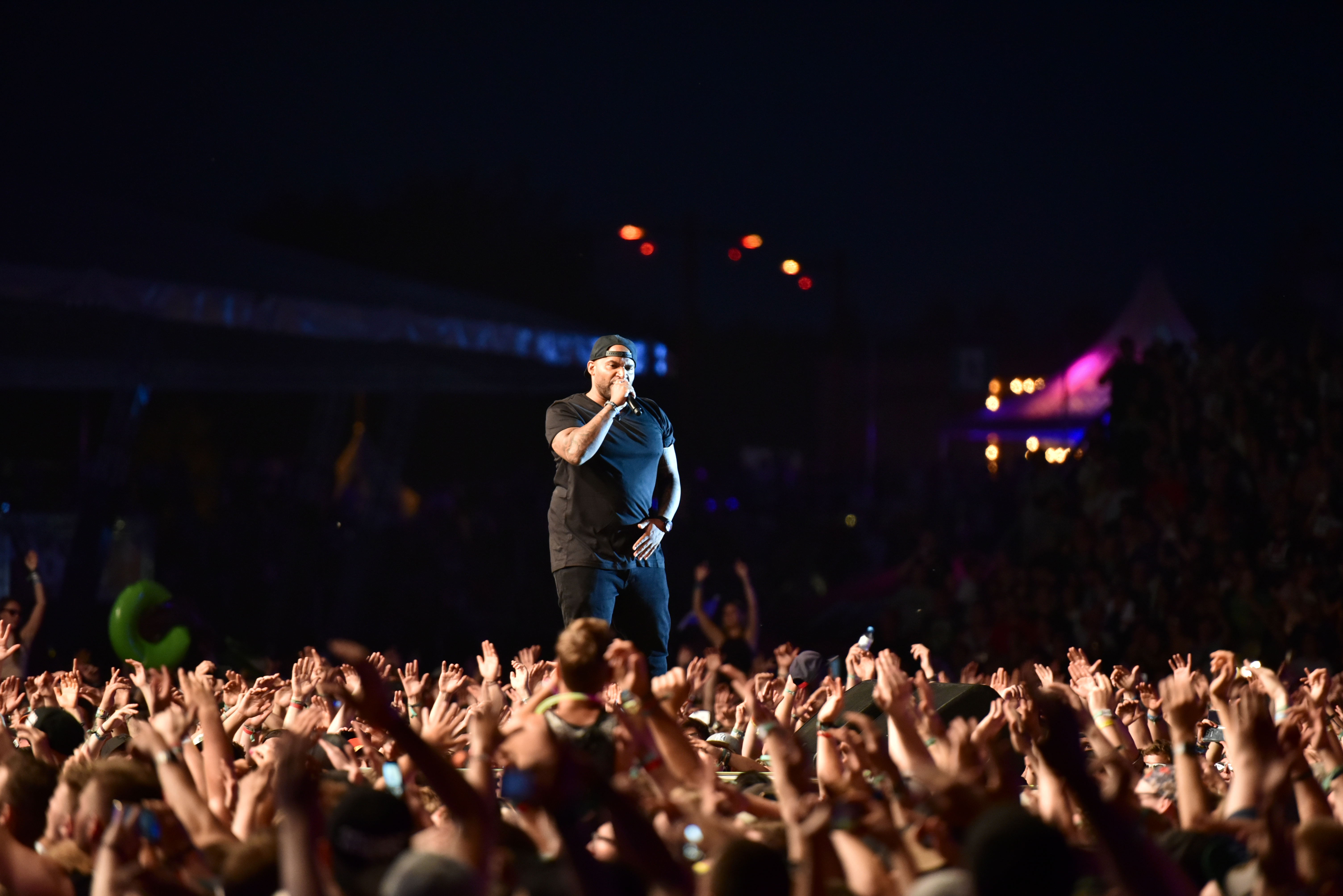 Der deutsche Rapper Olli Banjo beim splash! Festival 20 (2017). Er übernahm einen Feature-Part beim Auftritt des Rappers Kool Savas.